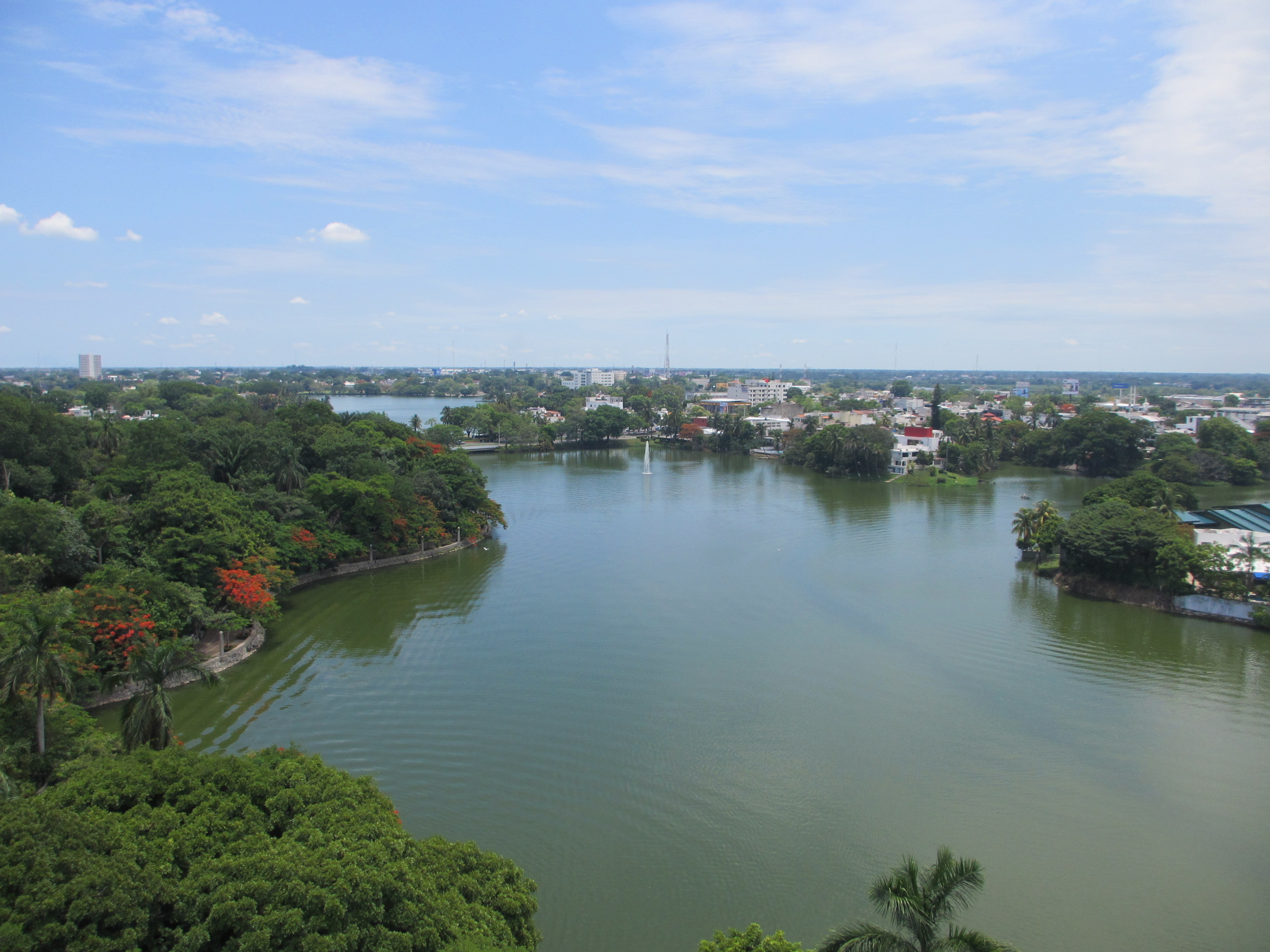 Panorámica del lado norte de la laguna de Las Ilusiones. Ciudad de Villahermosa, Tabasco, México.